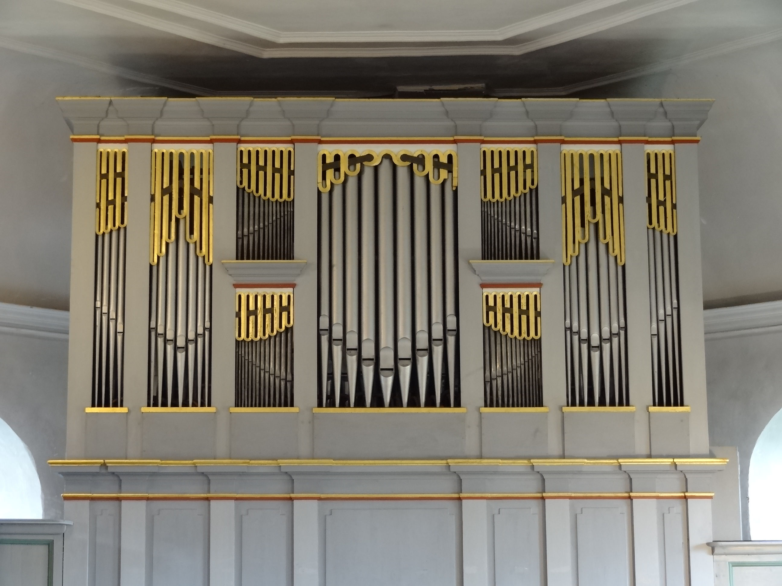 Evangelische Kirche Nieder-Bessingen